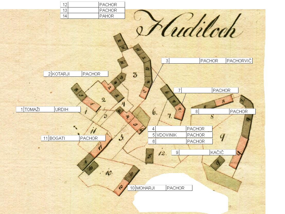 Franciscejski KATASTER HUDI LOG 1818 - 1850 z imeni hiš in priimki oseb povzeto po STATUS ANIMARUN